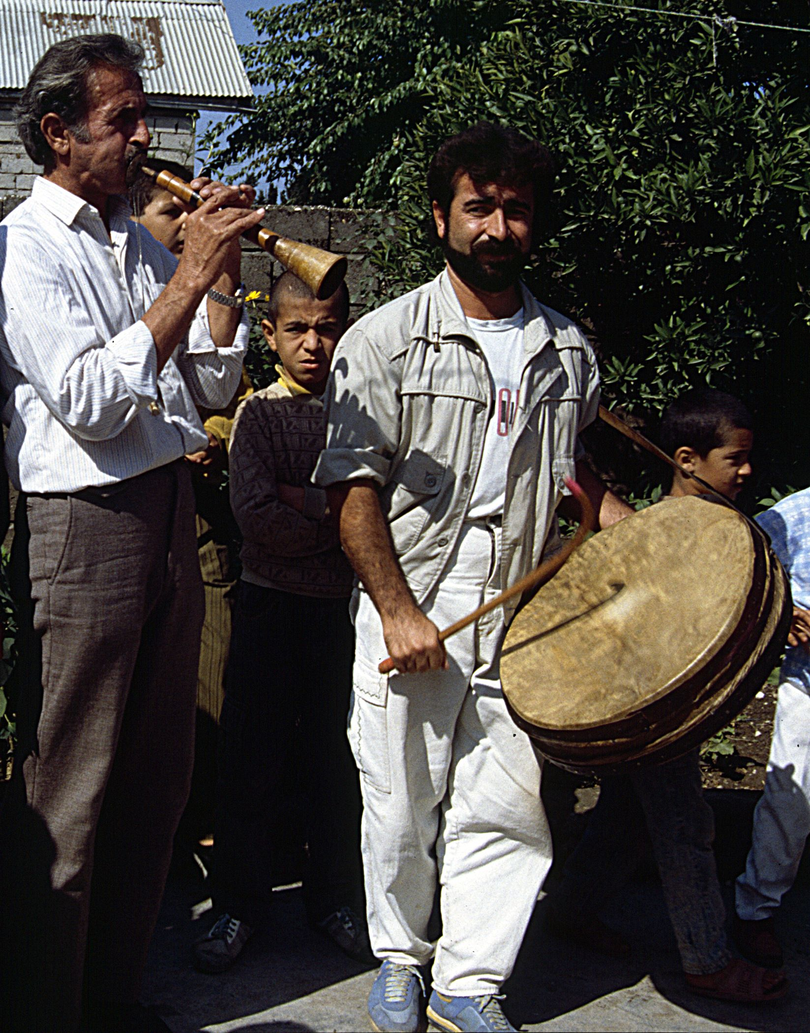 Hochzeit bei Nur (Kaspisee)